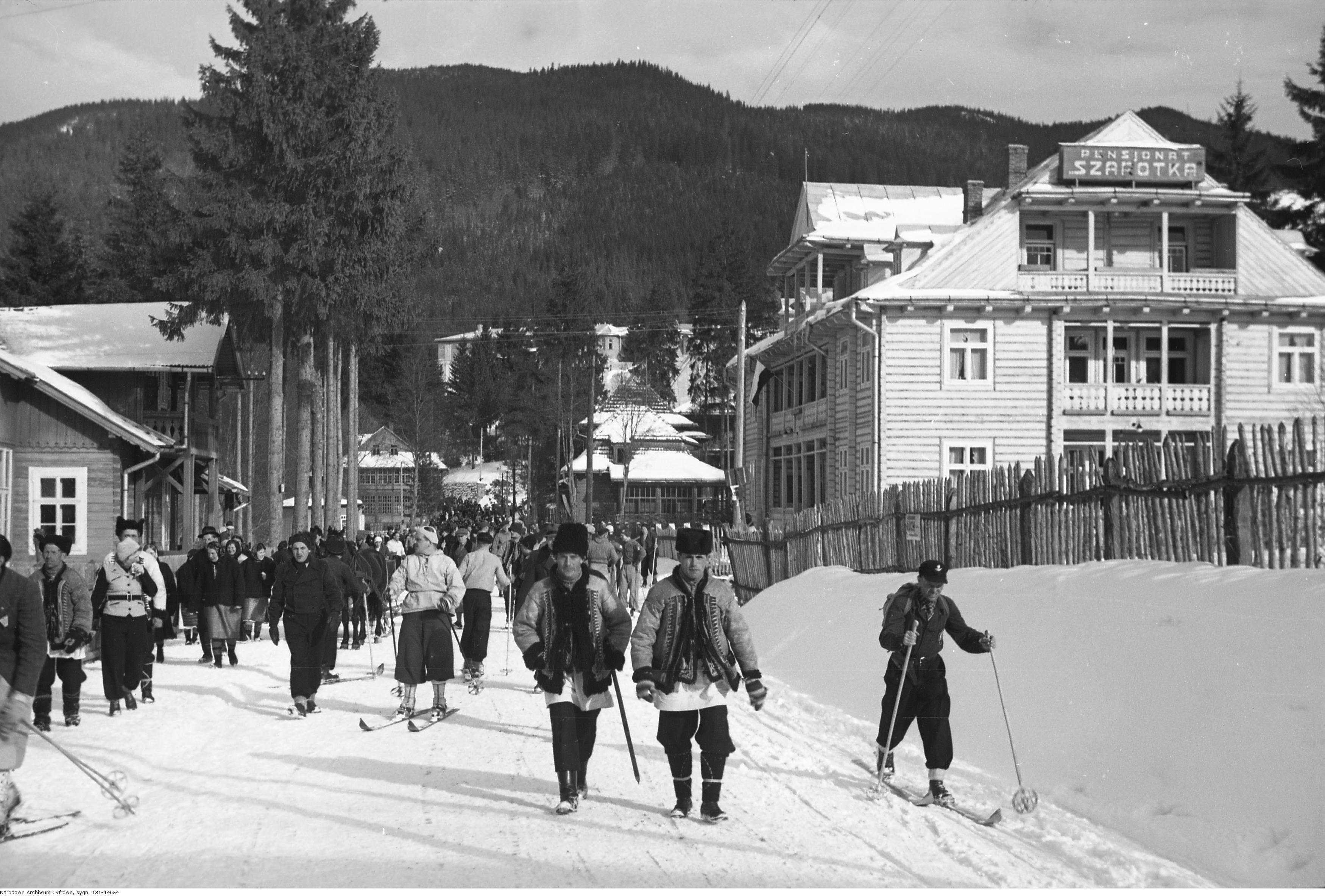 Pensjonat "Szarotka".